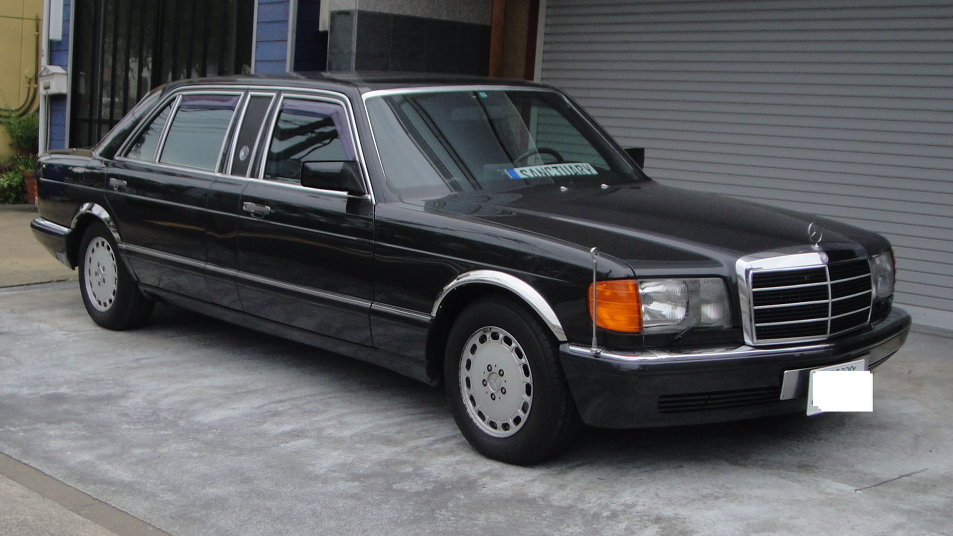 Mercedes-Benz 1000SEL TRASCO front view